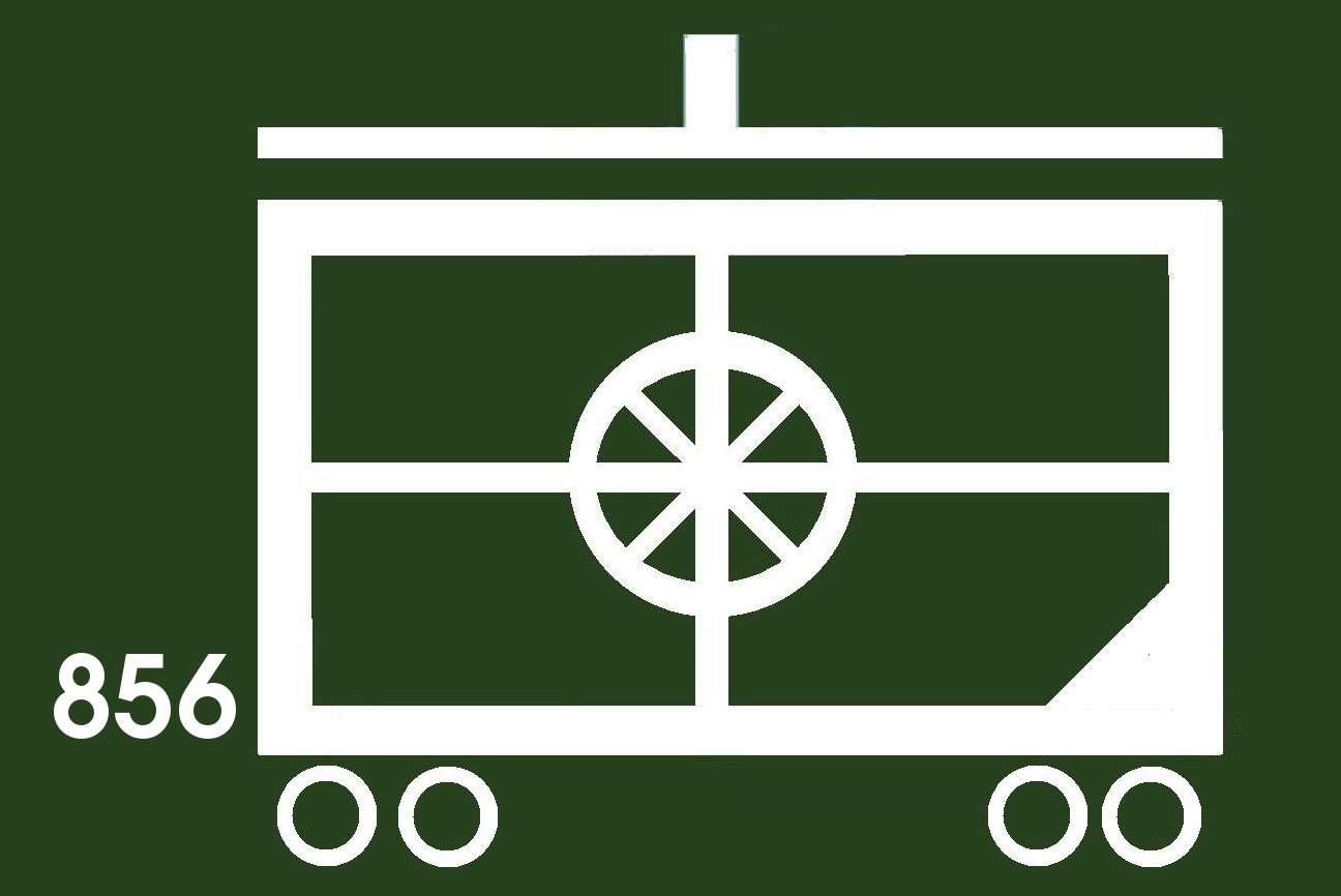 Krankentransportkompanie (Schiene) im Territorialheer der Bundeswehr